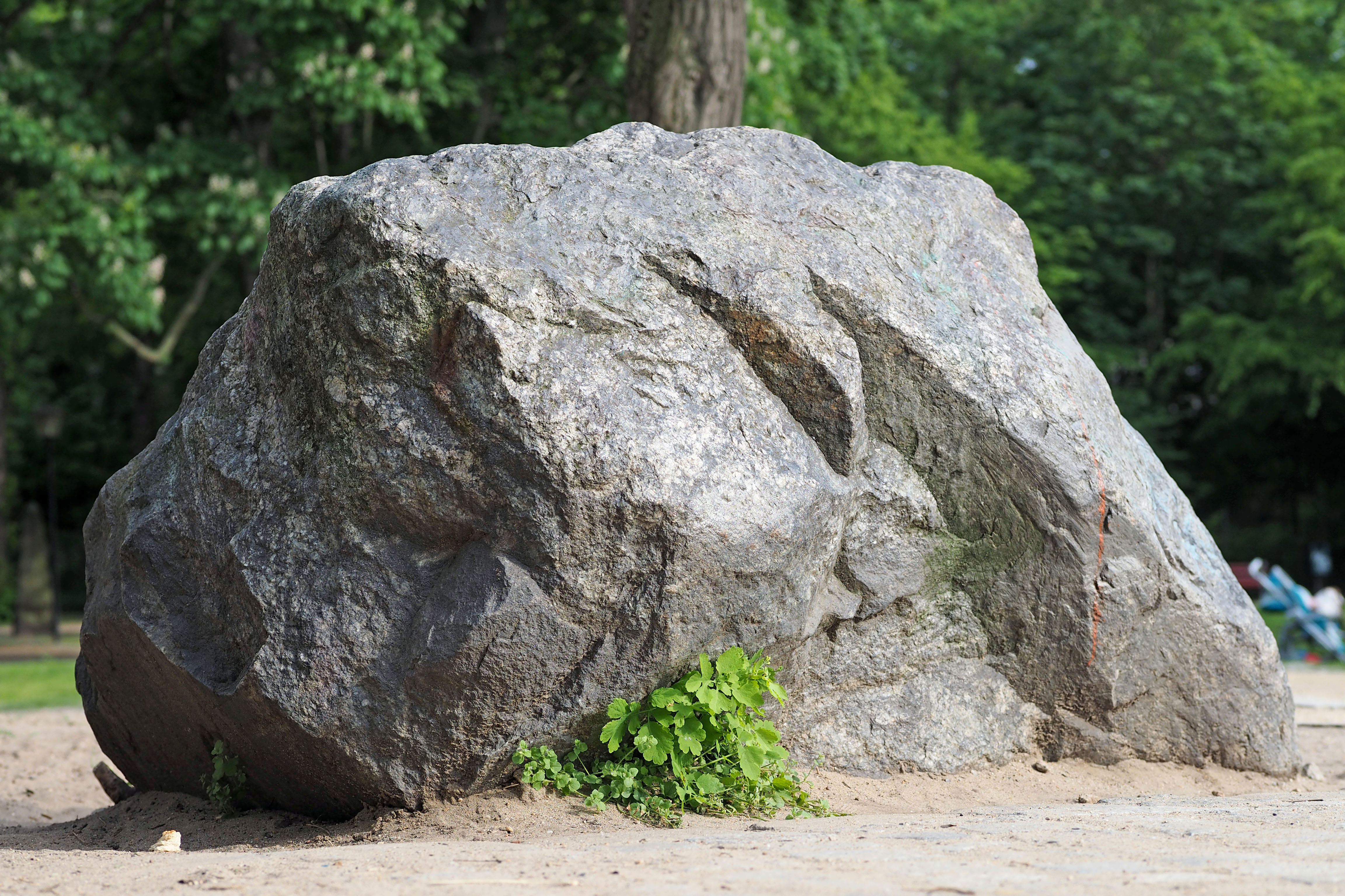 Naturdenkmal 7-11/F der Stadt Berlin, Findling Heinrich-Lassen-Park am kleinen Spielplatz